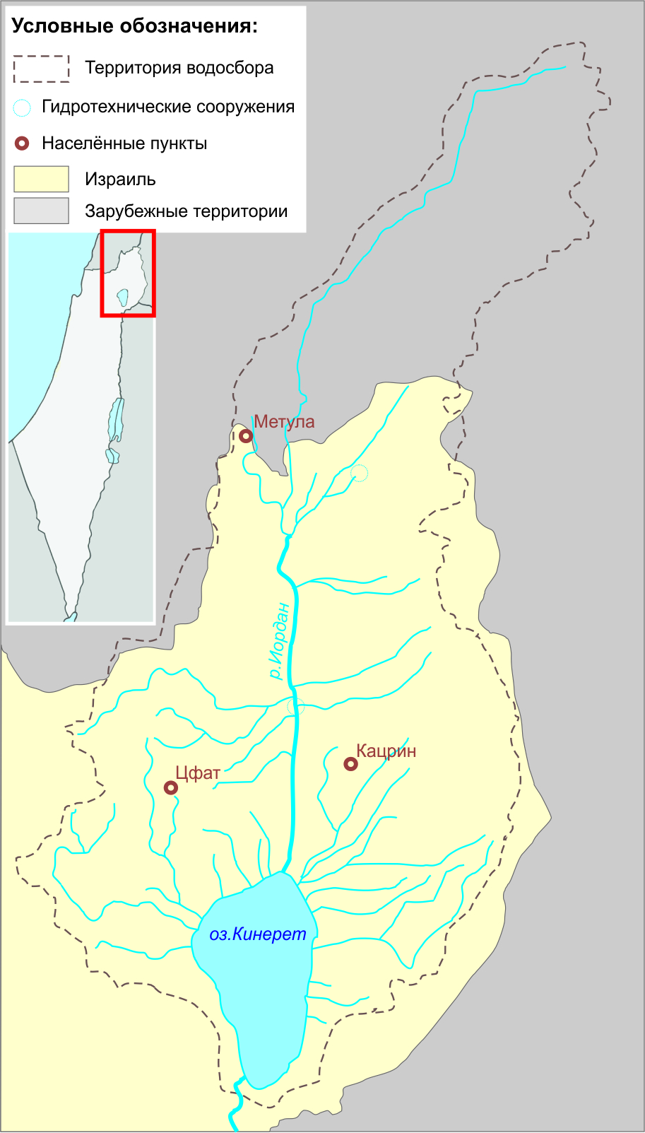 Карта водосборного бассейна озера Кинерет / водные ресурсы государства Израиль